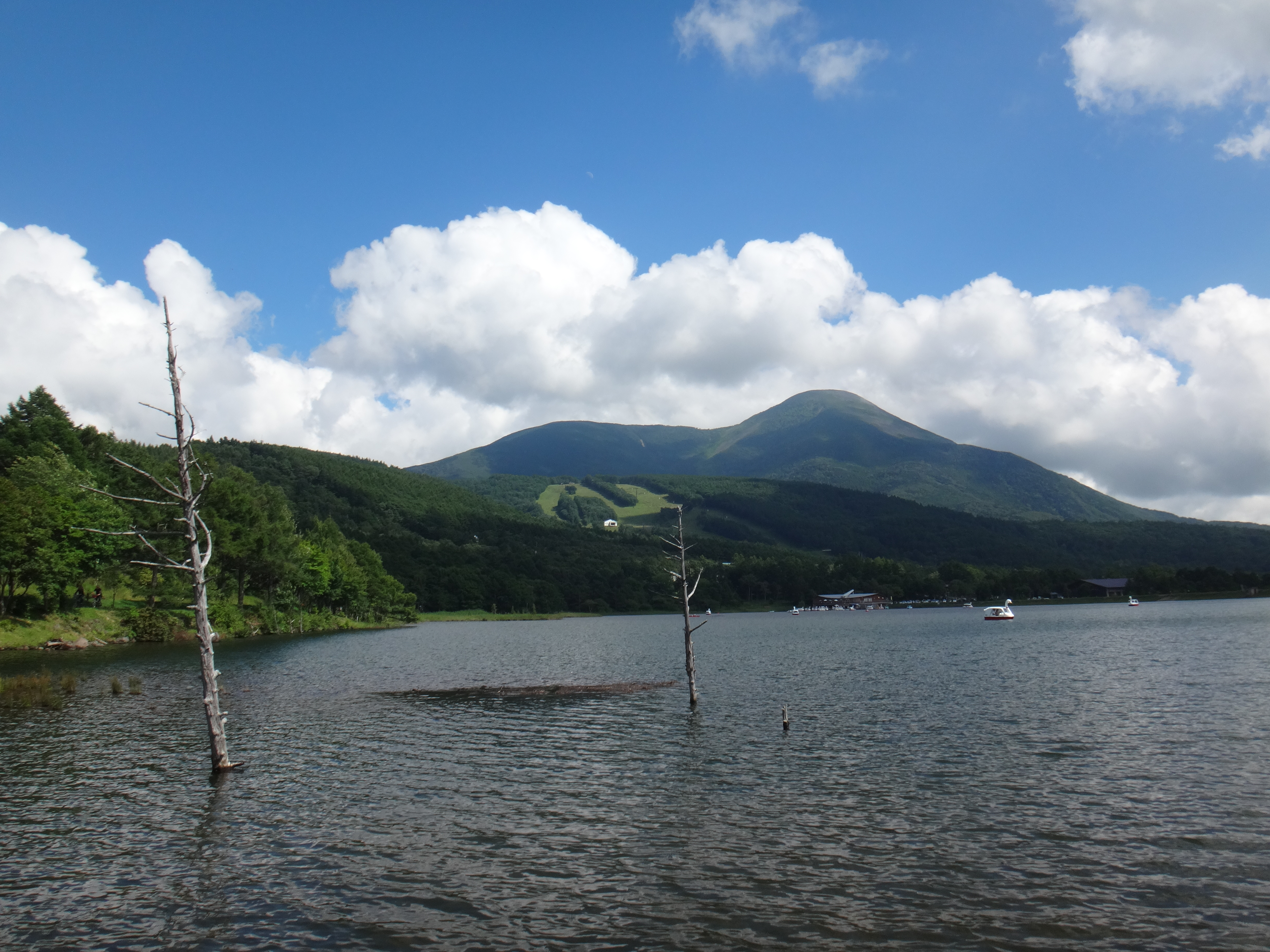 女神湖から蓼科山を望む